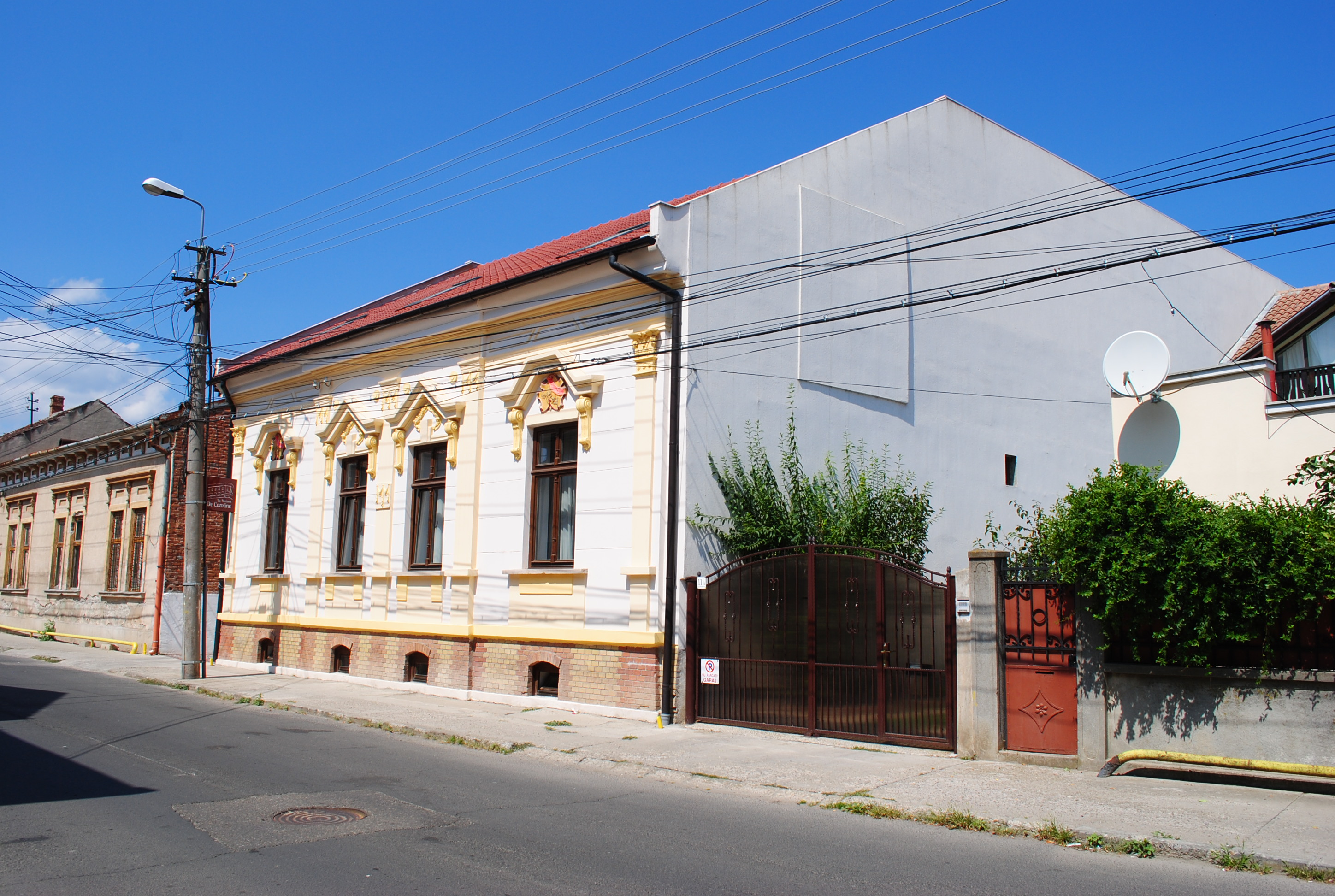 Casă, cca. 1900